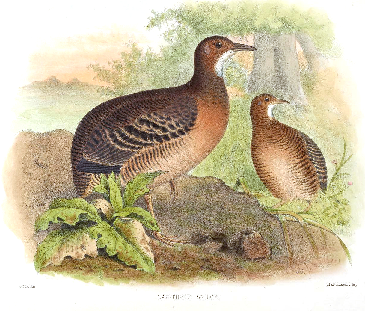 Crypturus sallcei= Crypturellus cinnamomeus